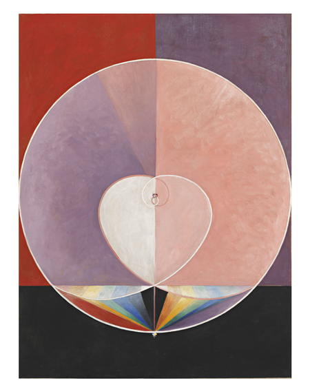 Hilma af Klint, The Dove, No. 13, 1915 Stiftelsen Hilma af Klints Verk and Moderna Museet. Photo: Albin Dahlström/Moderna Museet.